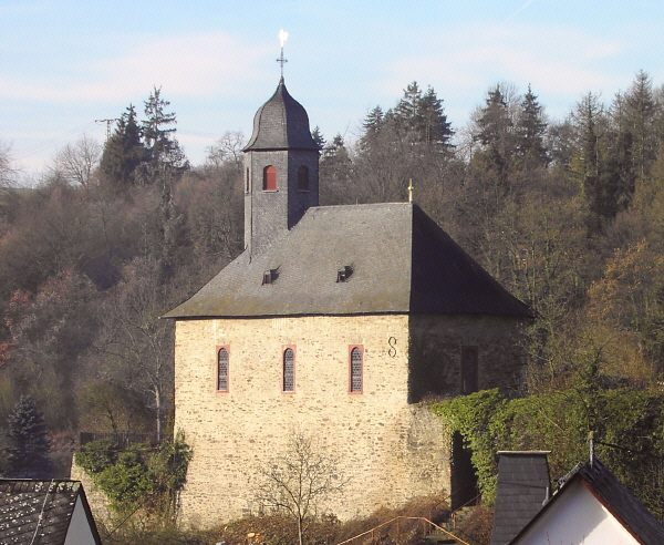 Blick auf die Reichenberger Kirche von Südosten